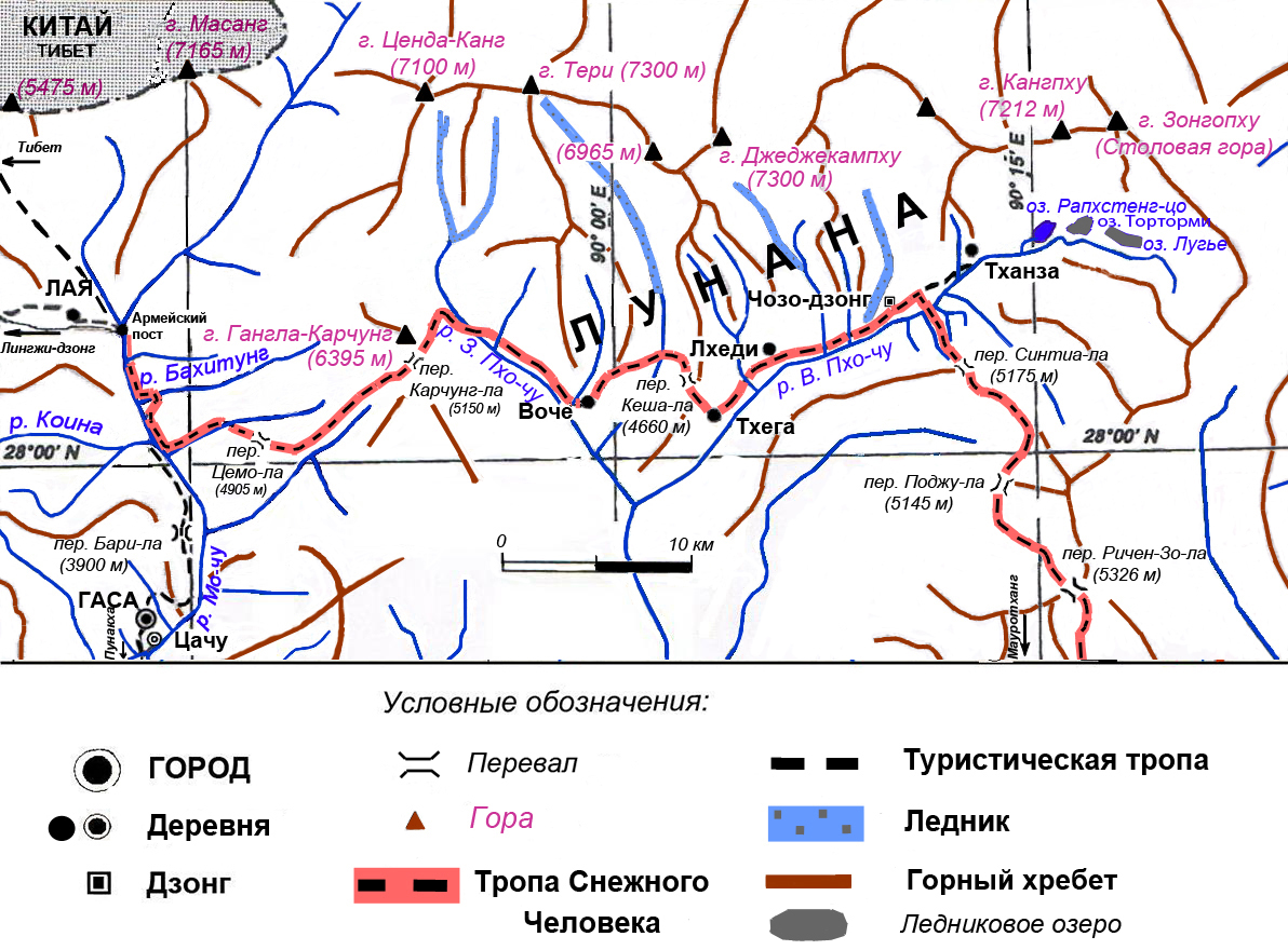 Карта-схема дзонгхага Гаса в Бутане